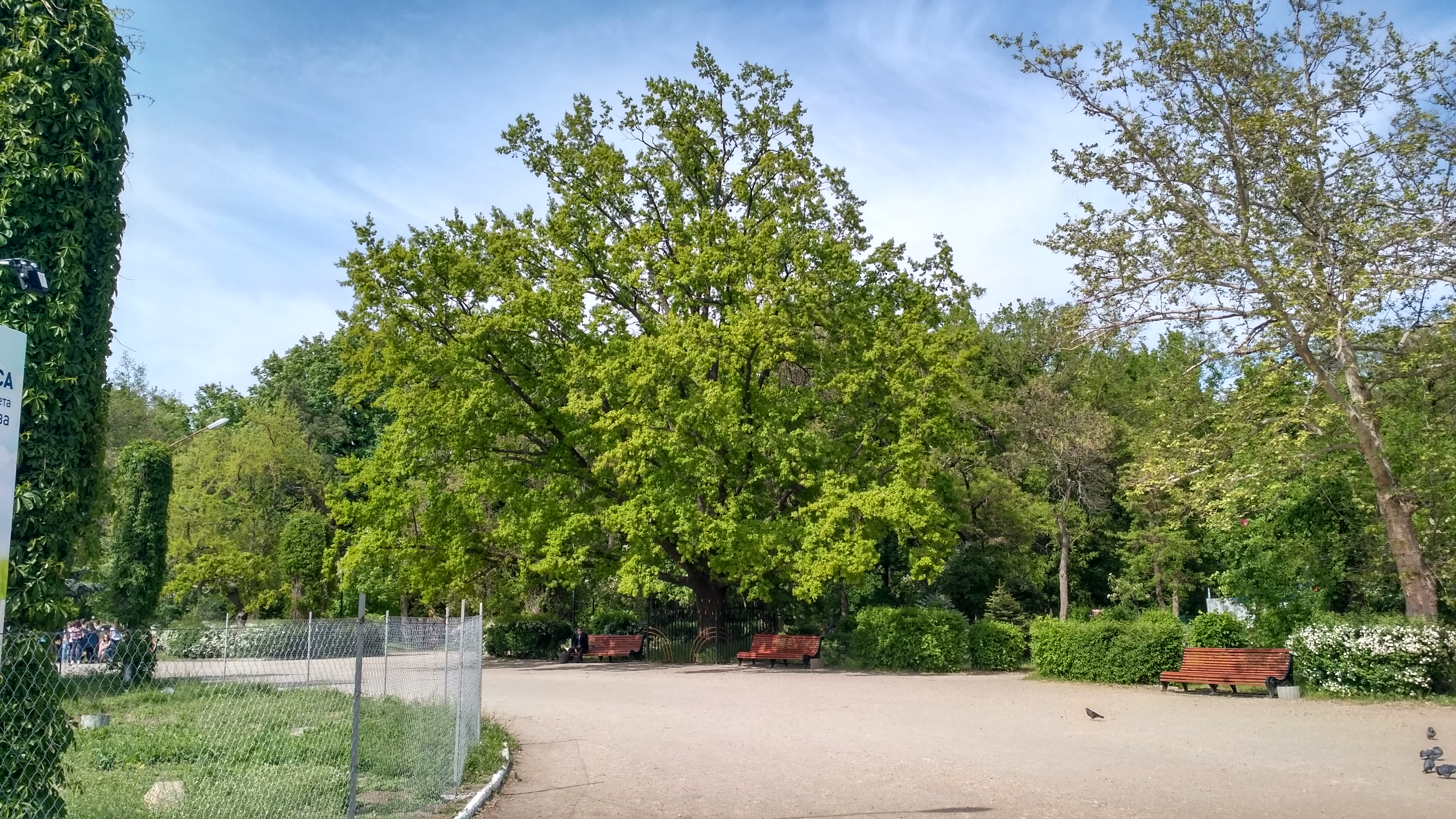 «Парк ім.. Горького», м. Мелітополь, вул. Богдана Хмельницького